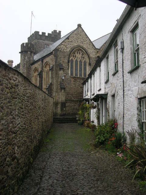 DULVERTON, Somerset